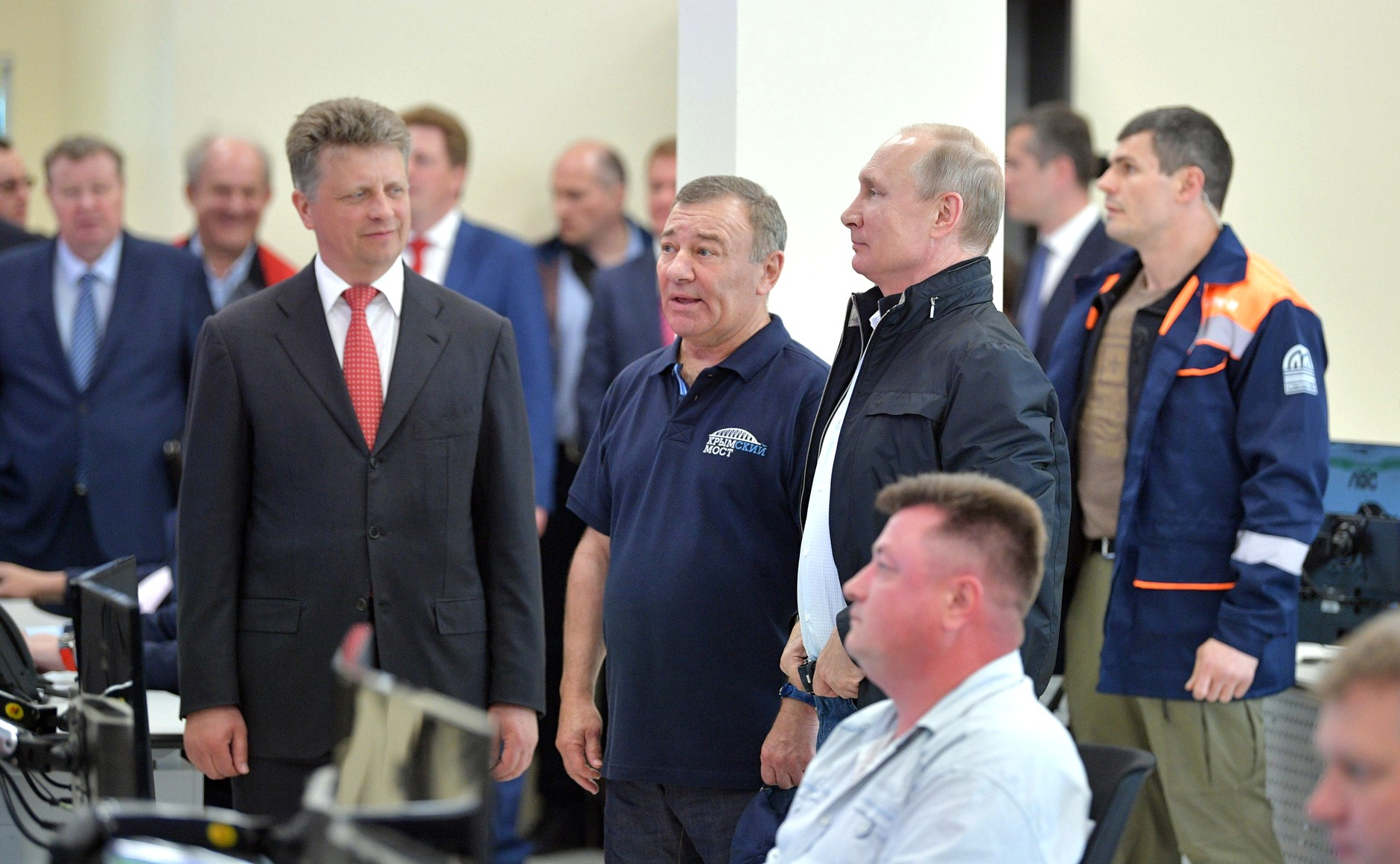 Открытие Крымского моста